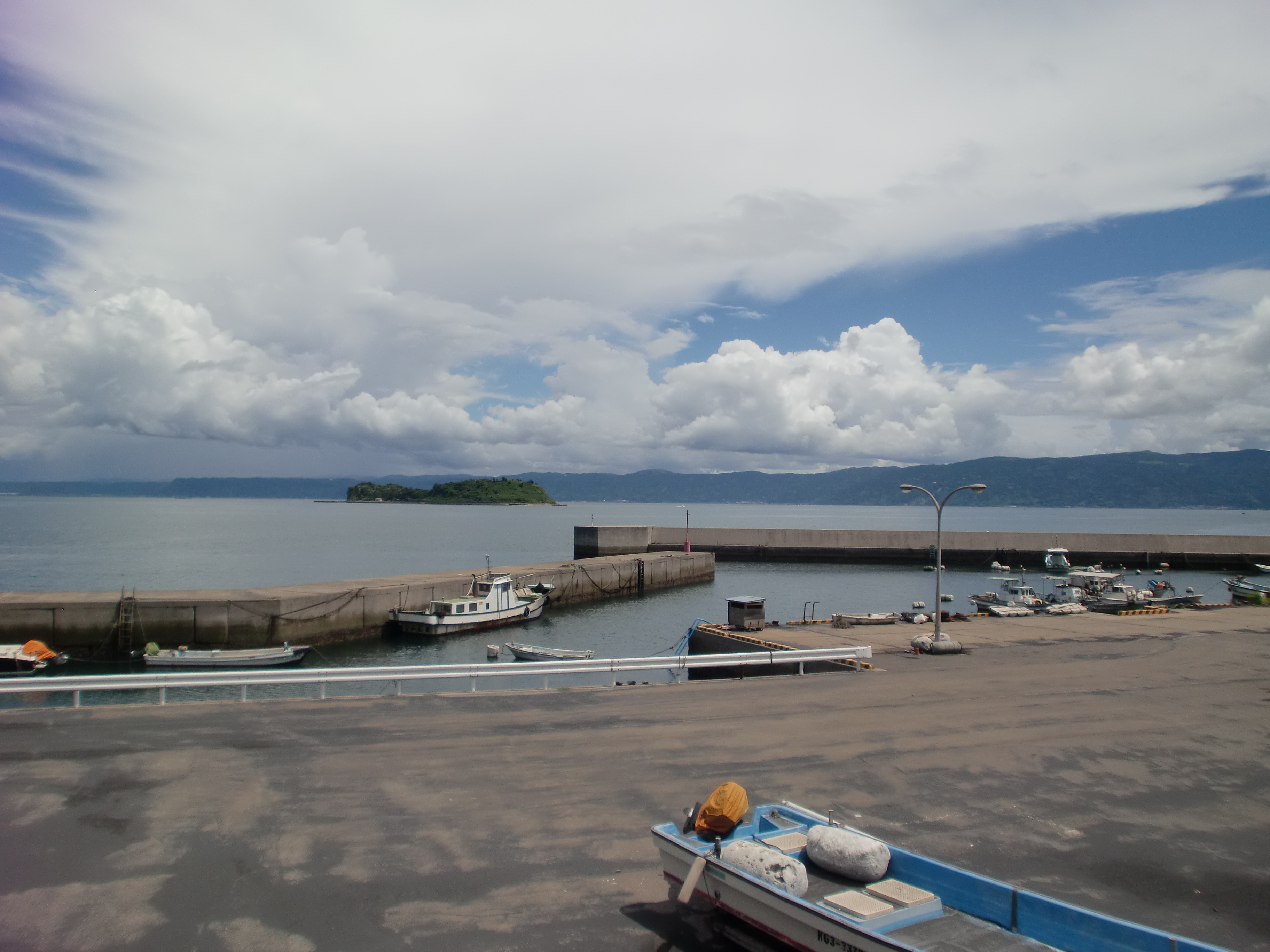 浦之前港の全景。新島と桜島間の行政連絡船の発着港となっている。